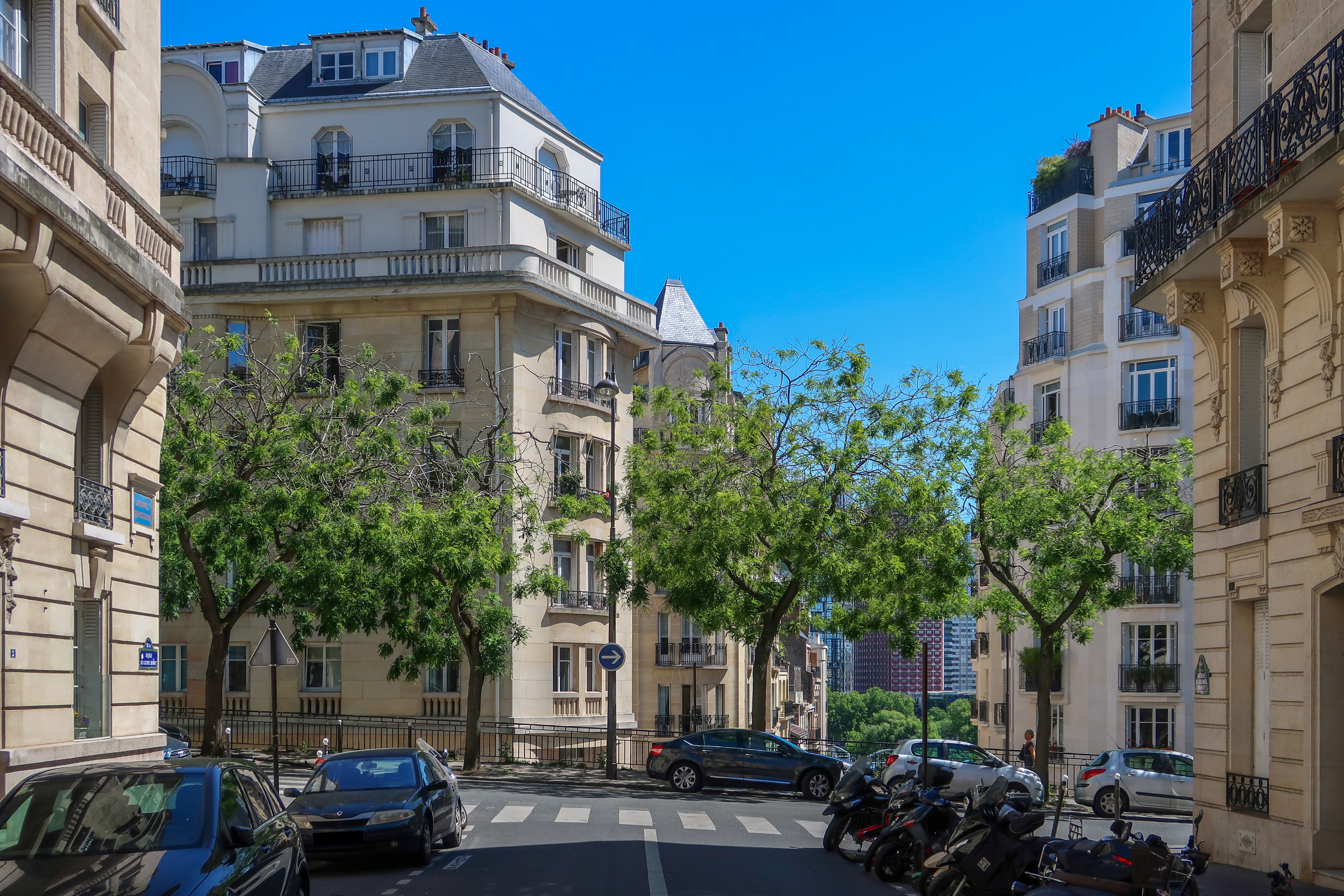 Intersection de l'avenue du Colonel-Bonnet et de la rue Raynouard (Paris, 16e).